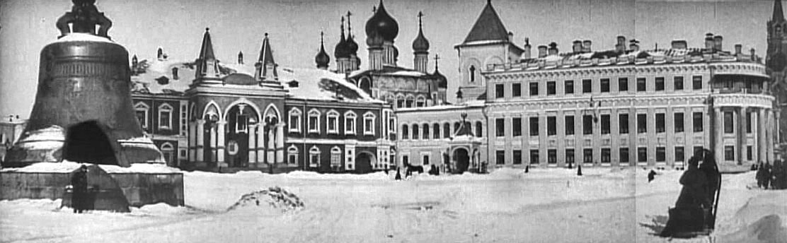 Слева направо: Царь колоколь, Чудова монастырь с Митрополичим корпусом, храм Благовещения и Алексия Митрополита, Малый Николаевский двроец.